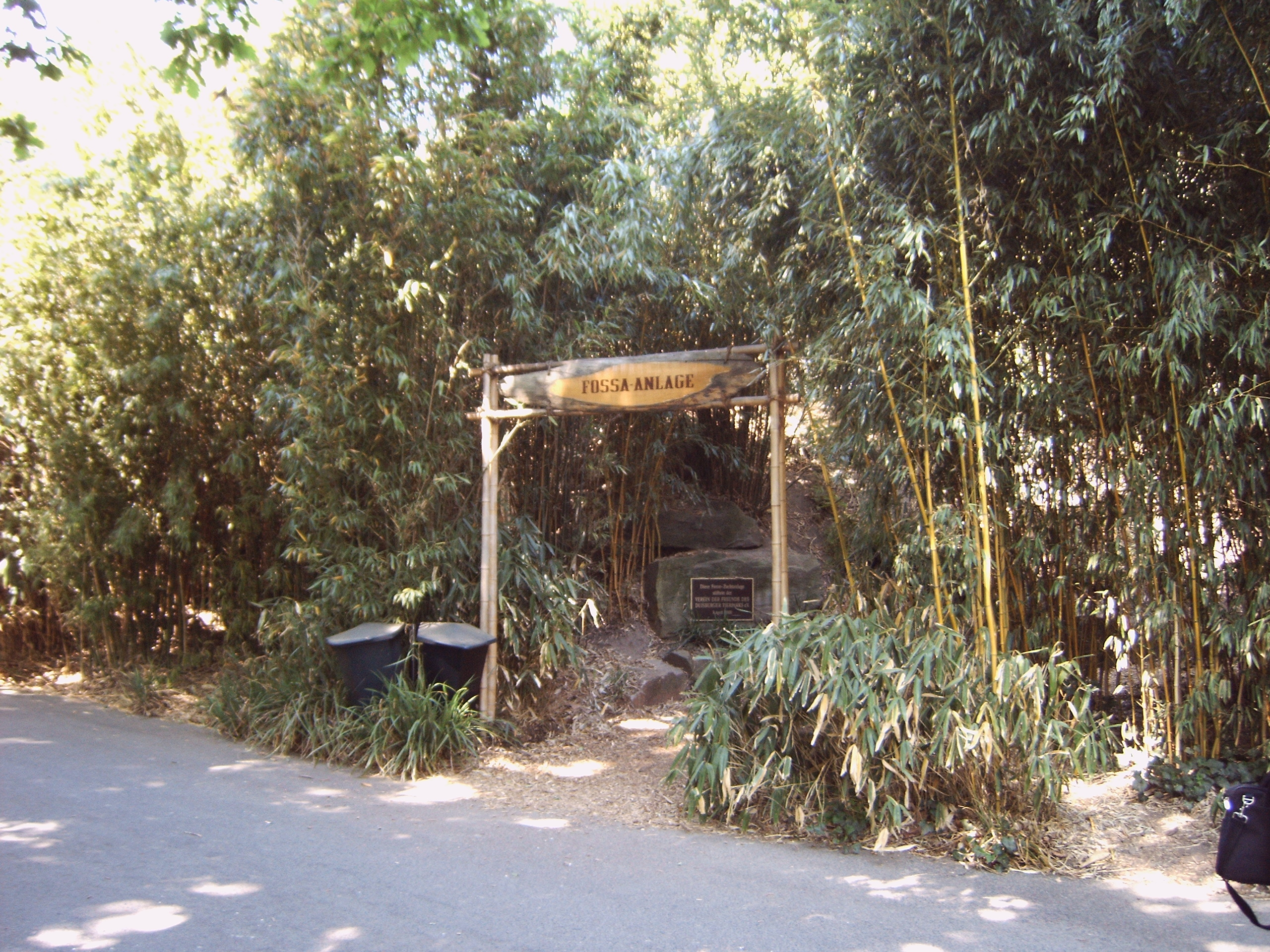 Fossaanlage im Duisburger Zoo, Kim Dasbeck